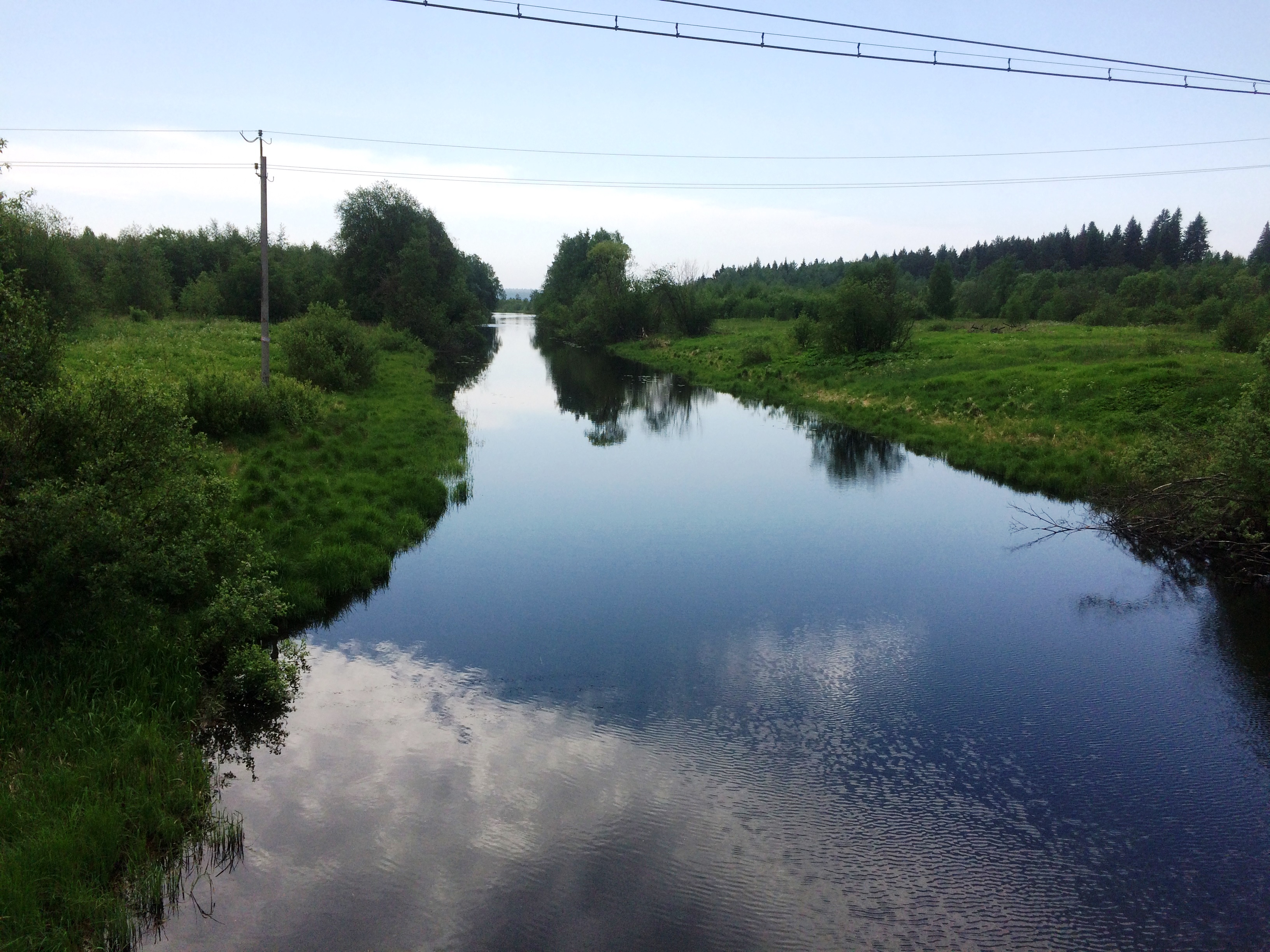 Кирккойоки